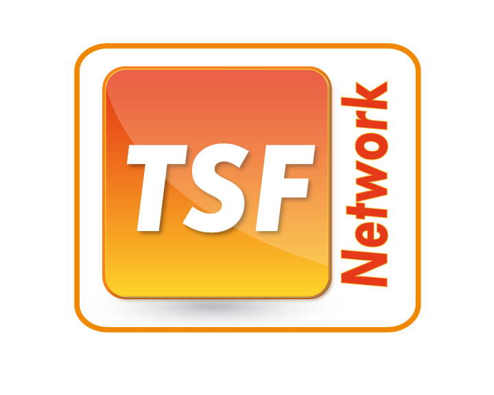 Logotype de TSF Network